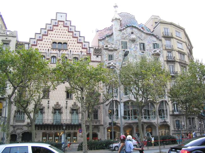 La Casa Batlló vue d'en bas. Oeuvre d'Antoni Gaudi à Barcelone (Espanya).